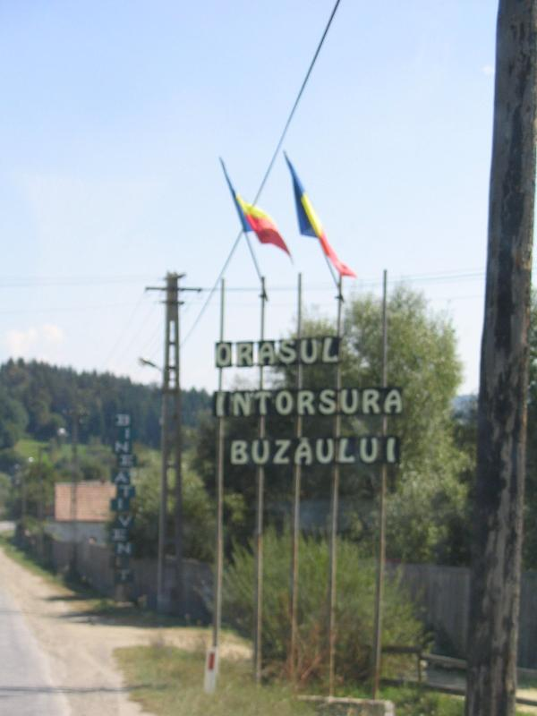 Bodzaforduló, városztábla, 2005